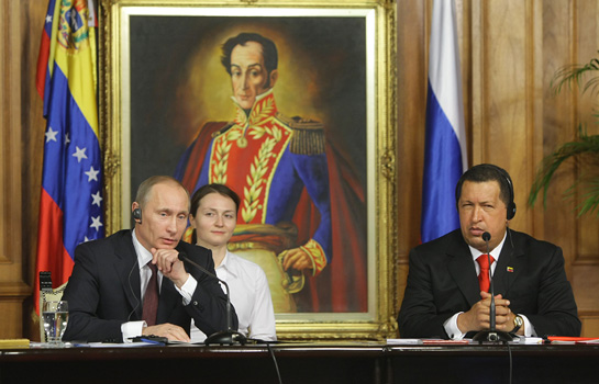 По итогам переговоров Председатель Правительства Российской Федерации В.В.Путин и Президент Боливарианской Республики Венесуэла У.Чавес провели совместную пресс-конференцию